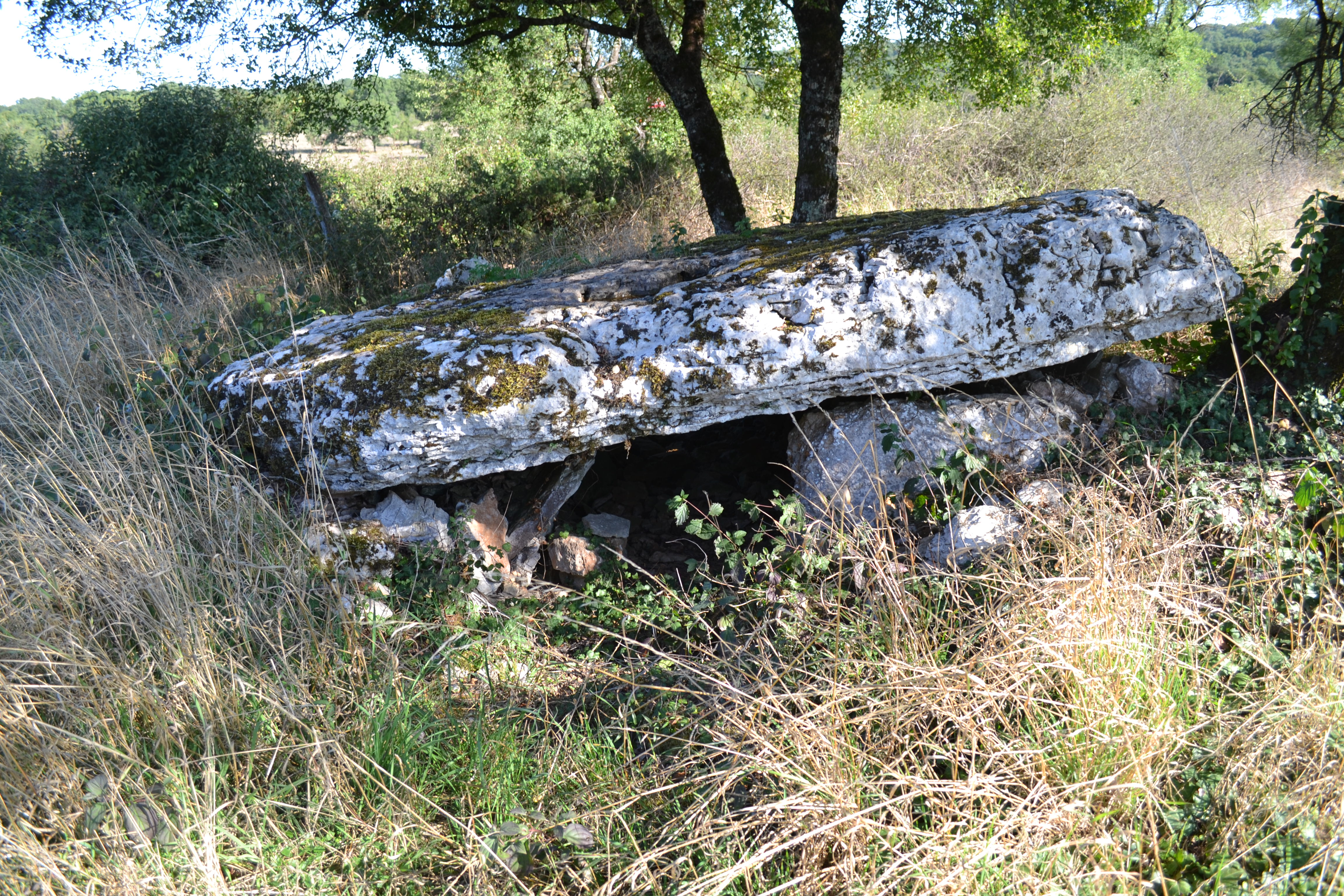 Dolmen de la Baune, Issendolus, Lot